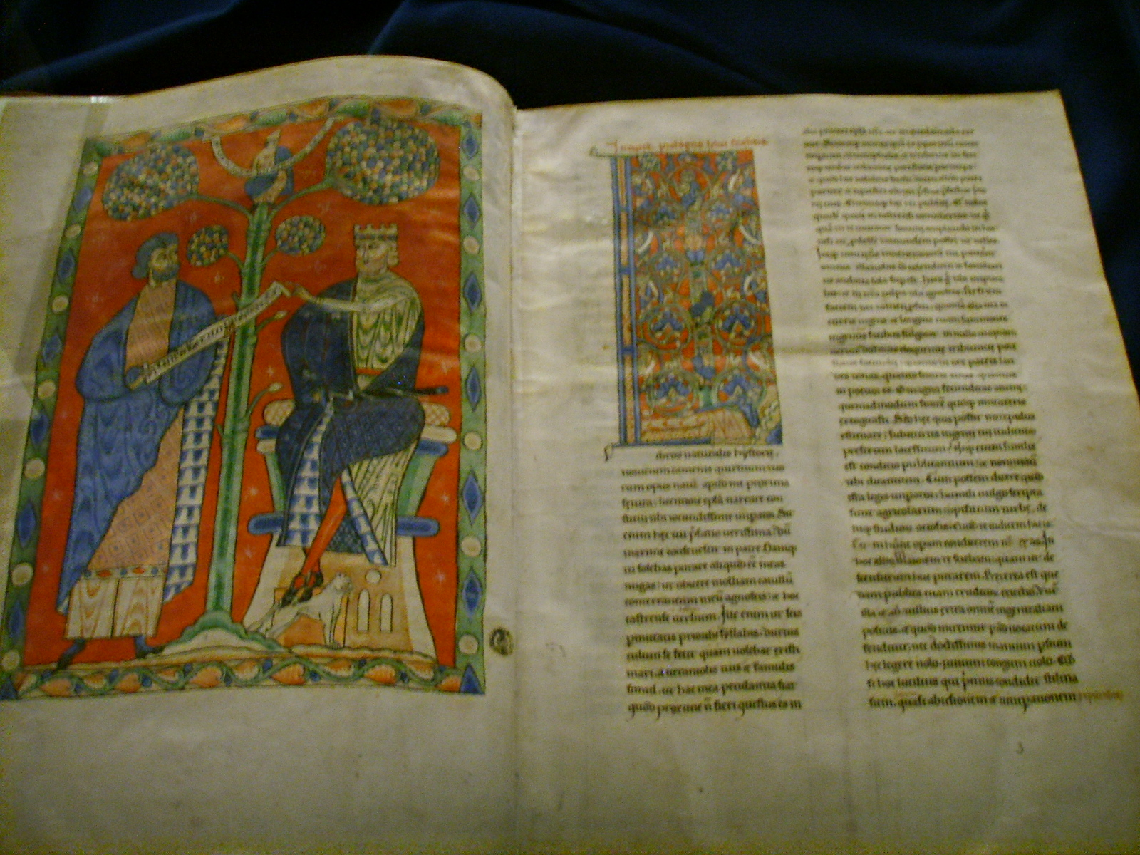 Danimarca XIII secolo, plinio historia naturalis